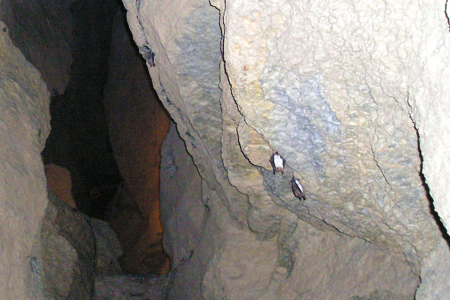 Spalte mit einigen Fledermäusen in der Goetz-Höhle, einer Spalt- und Klufthöhle in Meiningen.